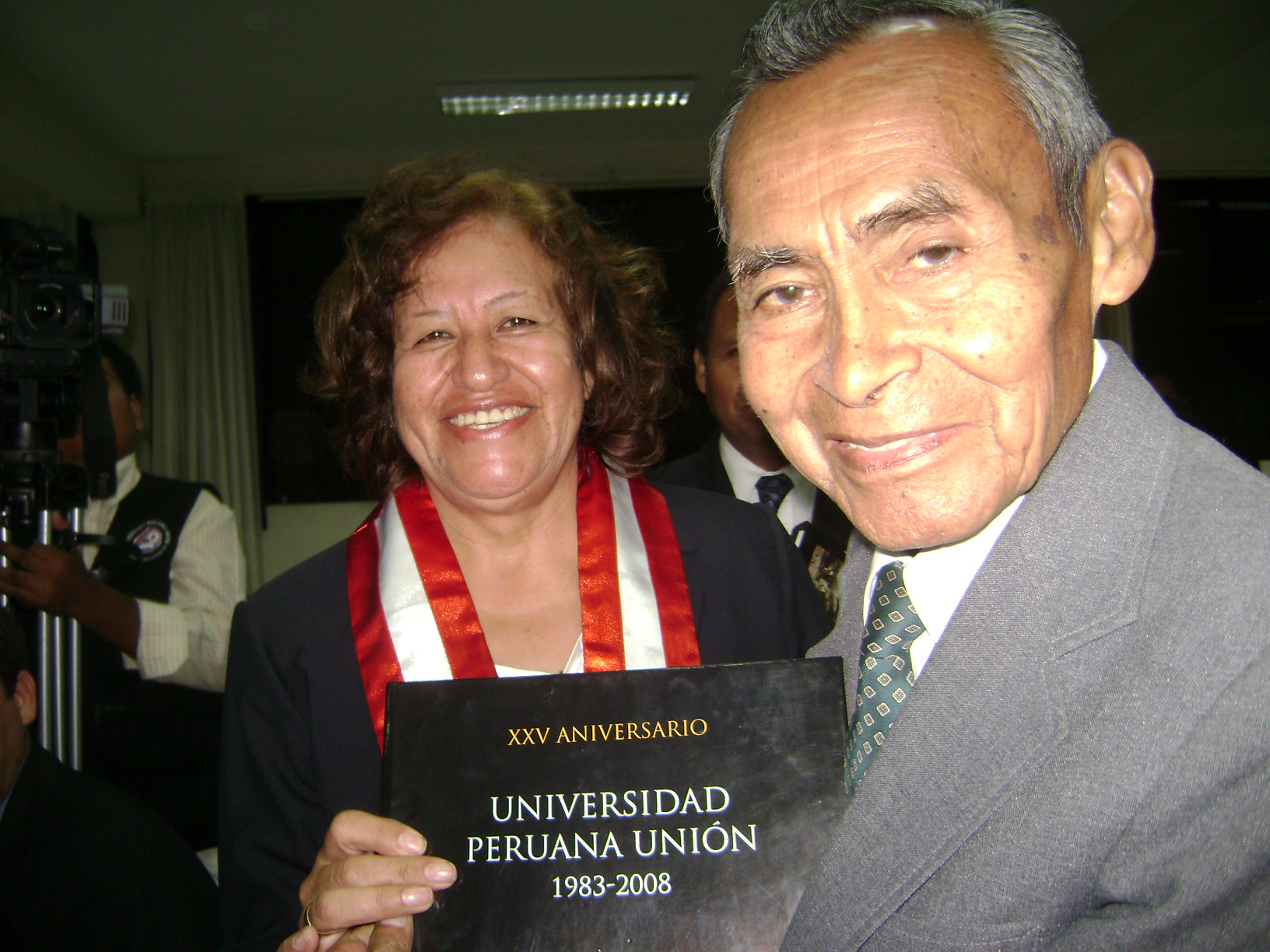 La Rectora de la UPEU le otorga el Libro de Plata al Dr. Rubén Castillo Anchapuri por su labor y contribución a la educación adventista.